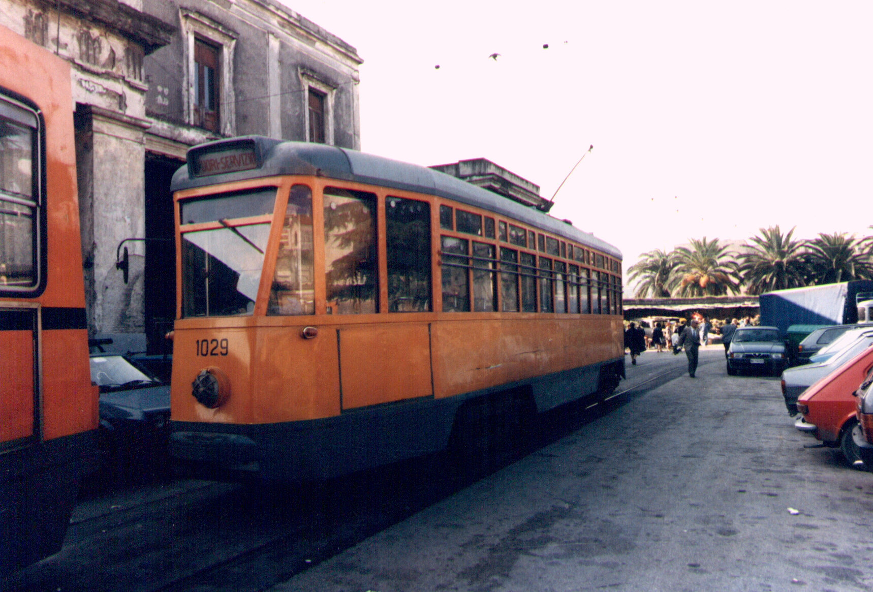 Tram a Napoli